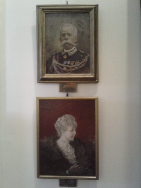 Portraits du Roi Umberto et de la reine Marguerite, peints par Pompeo Mariani